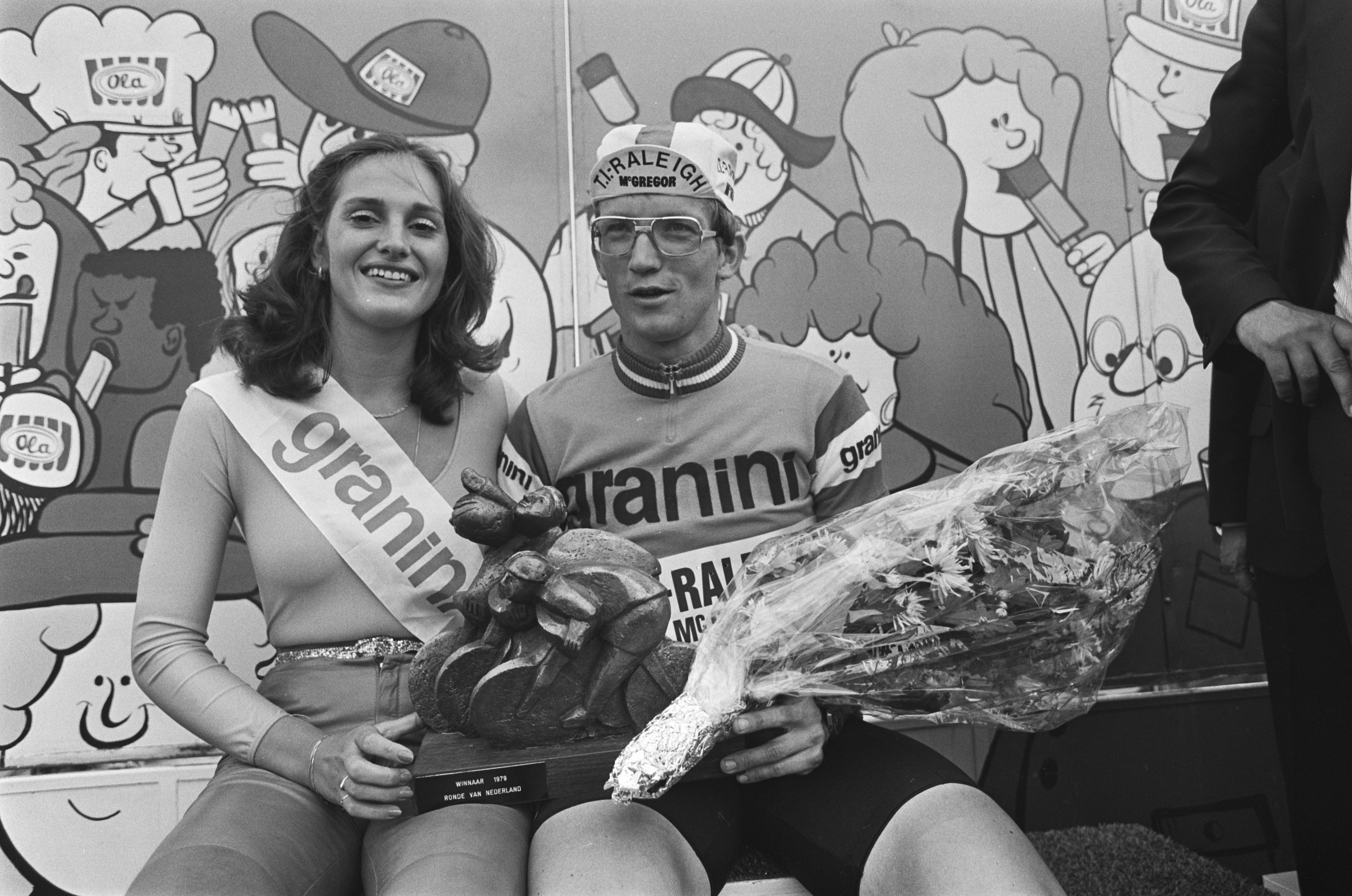 Collectie / Archief : Fotocollectie Anefo Reportage / Serie : Profronde van Nederland 1979 Beschrijving : Huldiging van de eindwinnaar Jan Raas Datum : 18 augustus 1979 Locatie : Hilvarenbeek, Noord-Brabant Trefwoorden : huldigingen, sport, wielrennen Persoonsnaam : Raas, Jan Fotograaf : Dijk, Hans van / Anefo Auteursrechthebbende : Nationaal Archief Materiaalsoort : Negatief (zwart/wit) Nummer archiefinventaris : bekijk toegang 2.24.01.05 Bestanddeelnummer : 930-4020